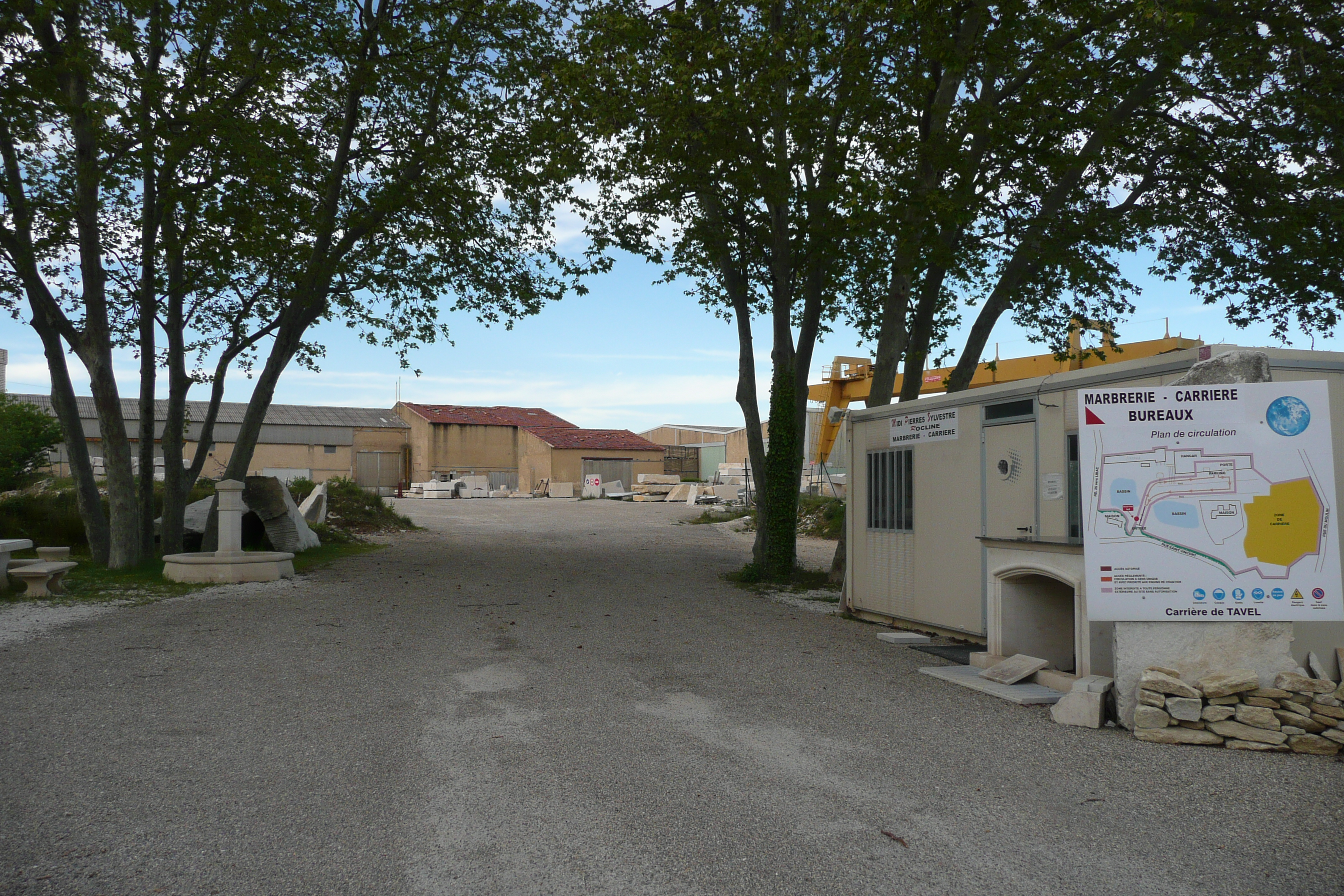 Marbrerie, Carrière à Tavel.